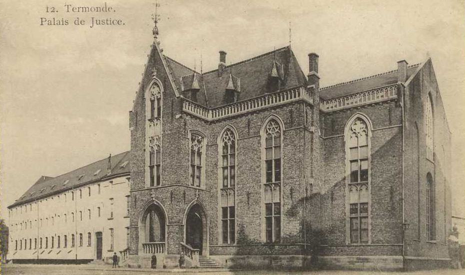 Het oude gerechtshof van Dendermonde - Dendermonde - Oost-Vlaanderen - Belgium